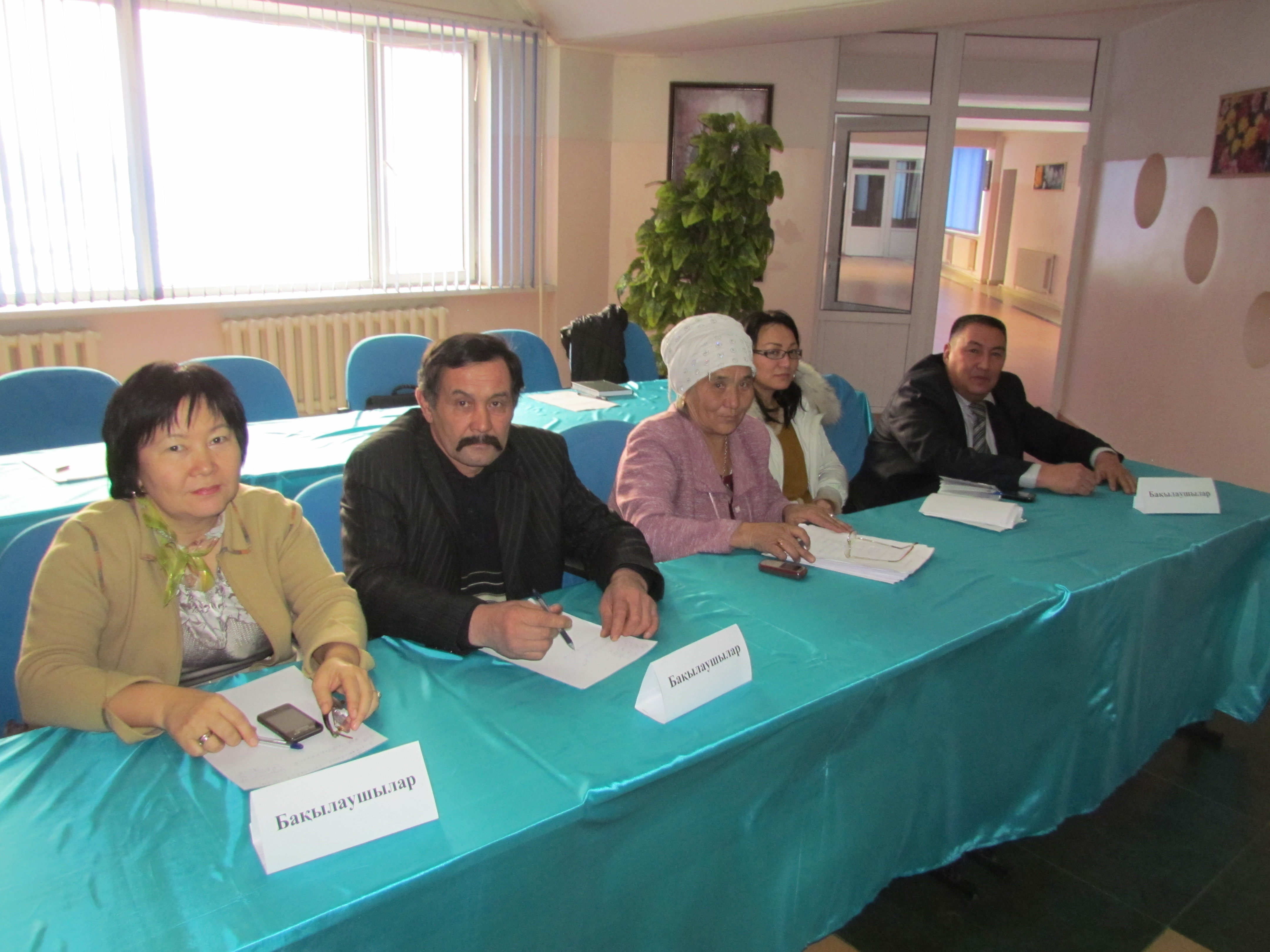 Наблюдатели на внеочередных выборах депутатов мажилиса парламента Республики Казахстан на избирательном участке № 472 в Алматы. 15 января 2012 года.